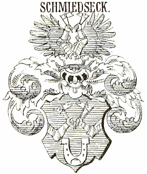 Wappen derer Schmid von Schmiedseck (Schmidt von Schmidtseck)